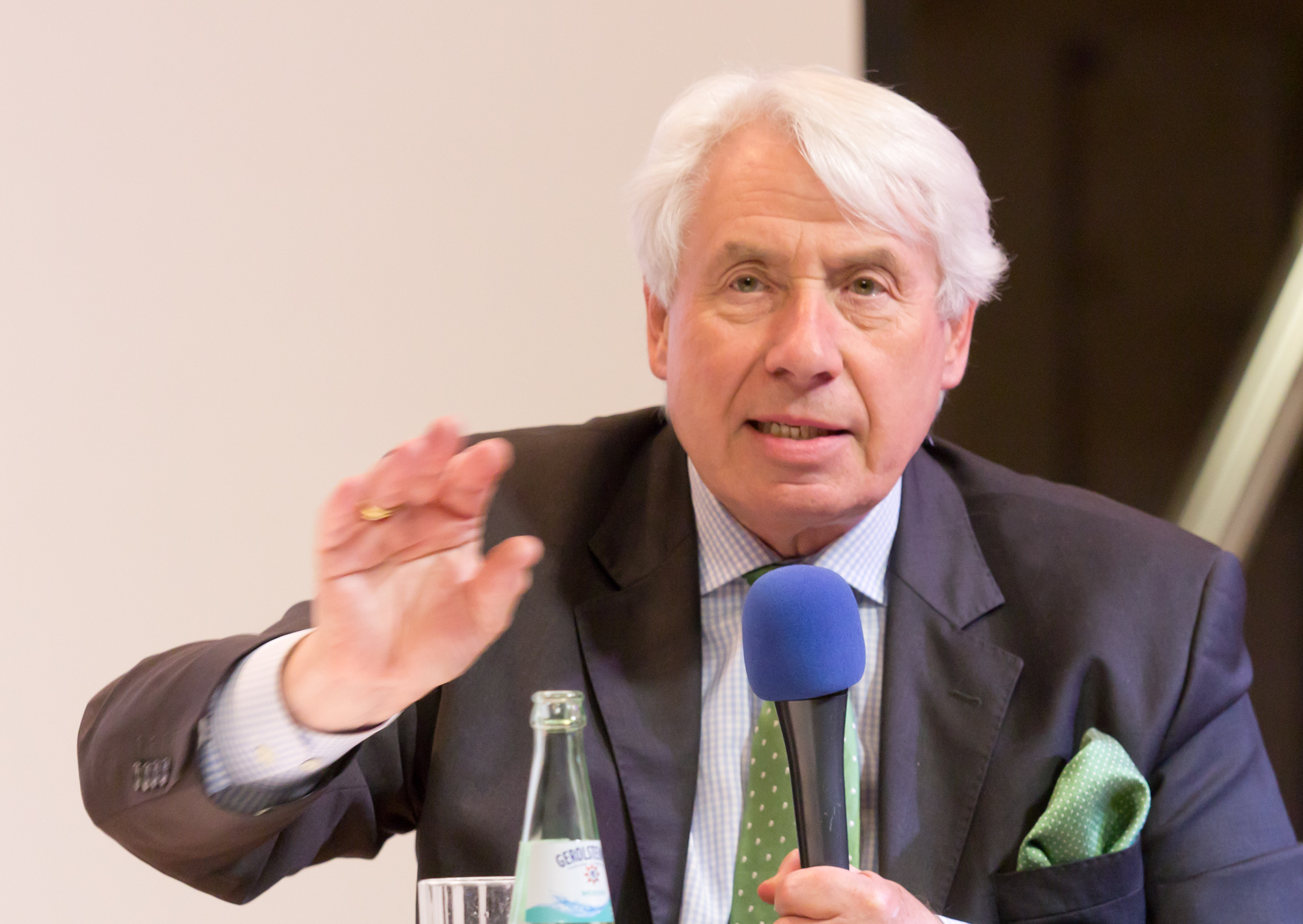 Udo Mainzer, deutscher Kunsthistoriker und Denkmalpfleger, ehemaliger Direktor des LVR-Amtes für Denkmalpflege im Rheinland und Landeskonservator des Landschaftsverbandes Rheinland (LVR), bei einem vortrag mit DIskussionsrunde beim Architekturforum Rheinland; Domforum, Köln.